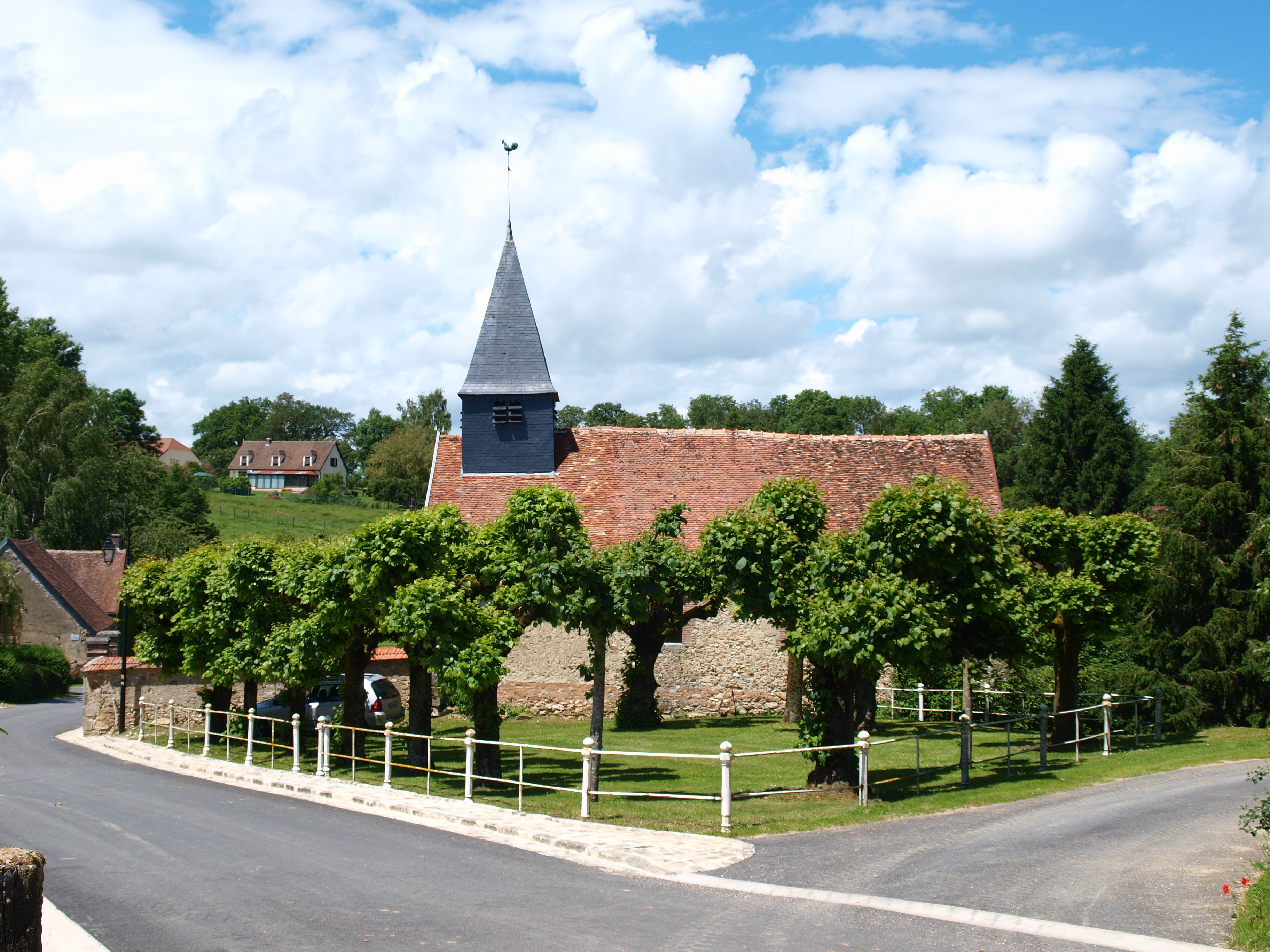 Église Saint-Ferréol de Bannay (Marne, France)